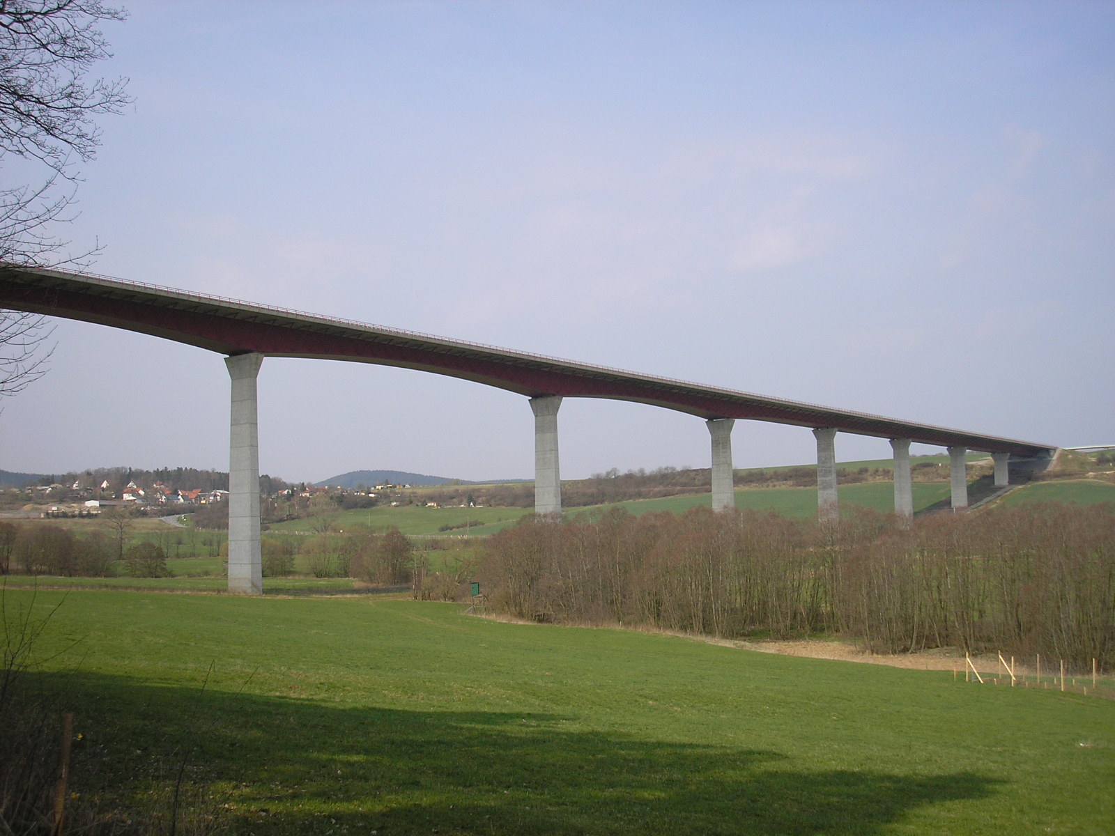 Talbrücke Reichenbach bei Ilmenau (Thüringen) A 71.